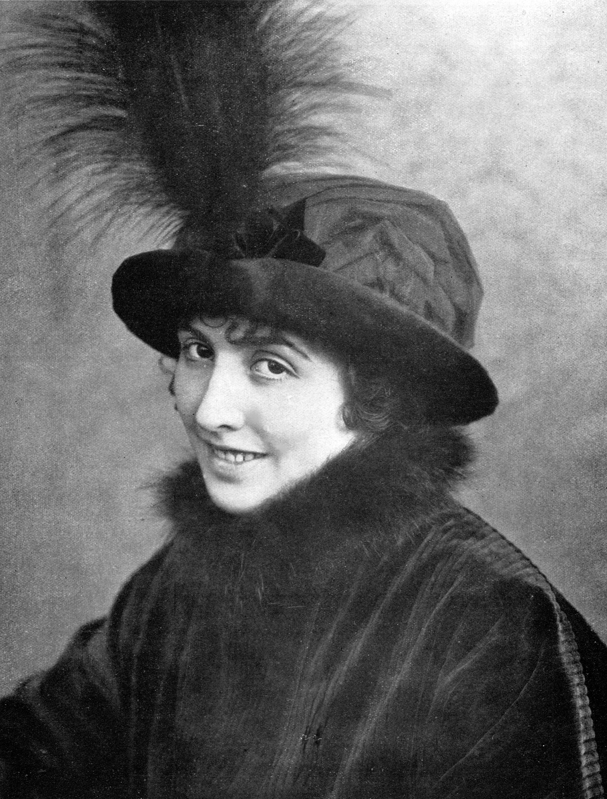 Gigetta Morano in una immagine del 1914